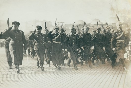 Снимка на ген. Христо Луков, гвардейци и други военни на тържествен марш пред двореца.